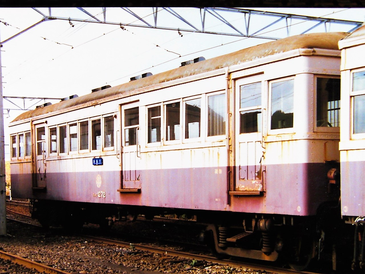 弘南鉄道クハニ1272 旧伊那電気鉄道買収国電 1984年撮影